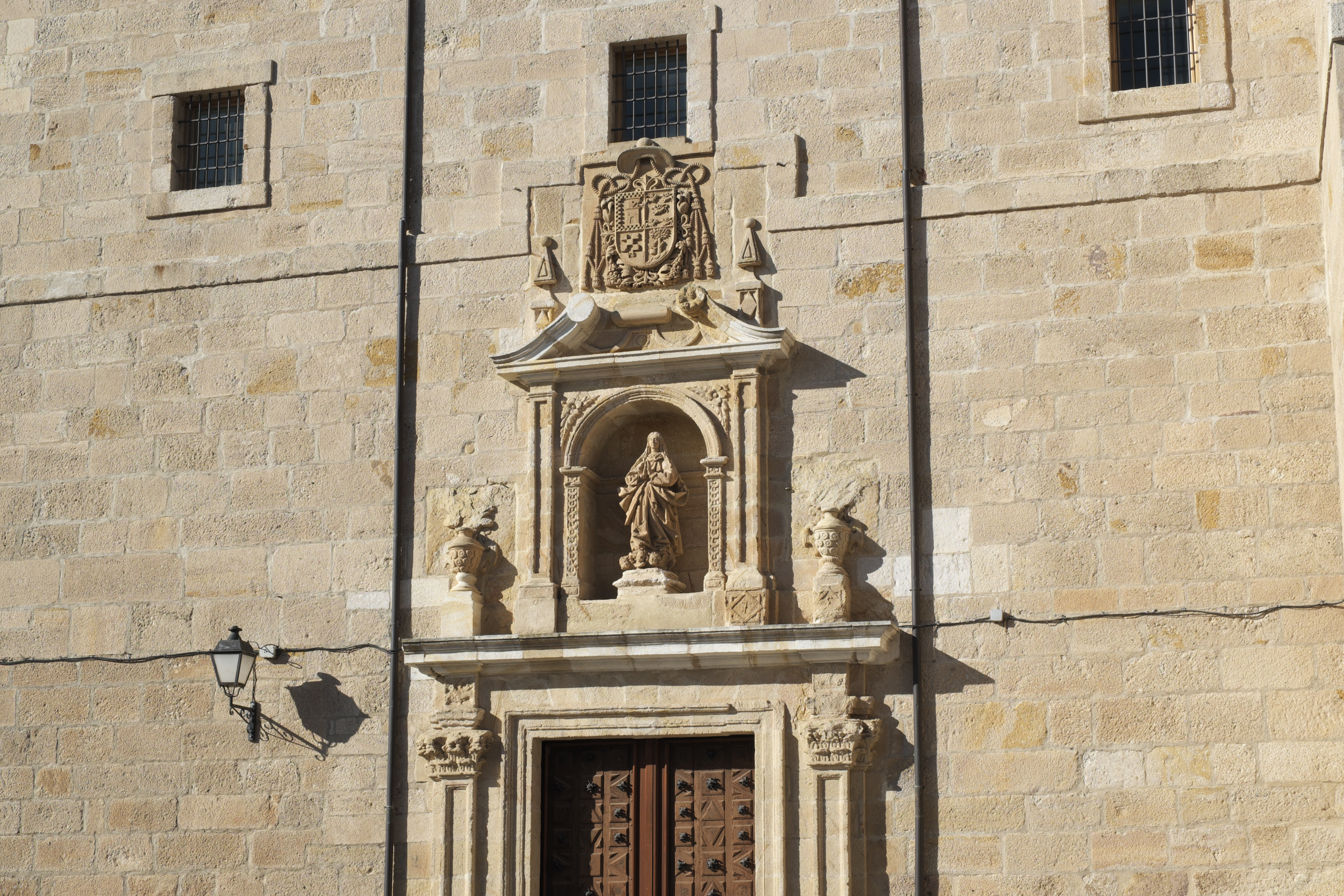 Biblioteca Pública, ehemalige Kirche Iglesia de la Concepcíon in Zamora (Kastilien-León/Spanien), Portal